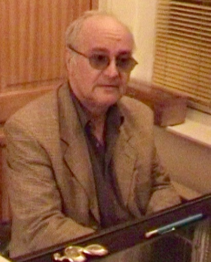 Bernard Maury au piano (clair)